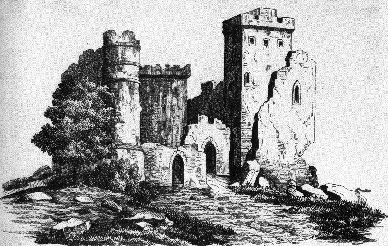 Opole, Zamek Górny